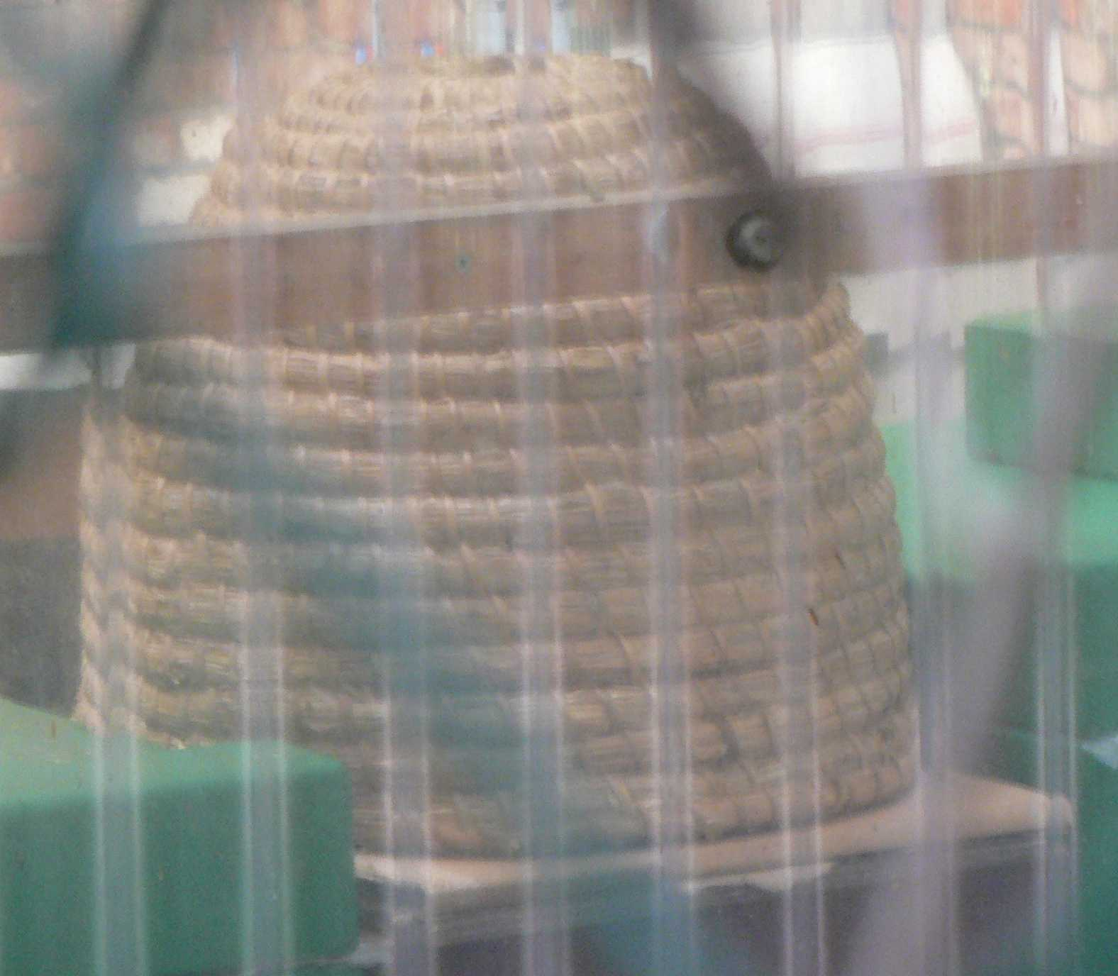 Een strooien bijenkorf, De Linde, Retie